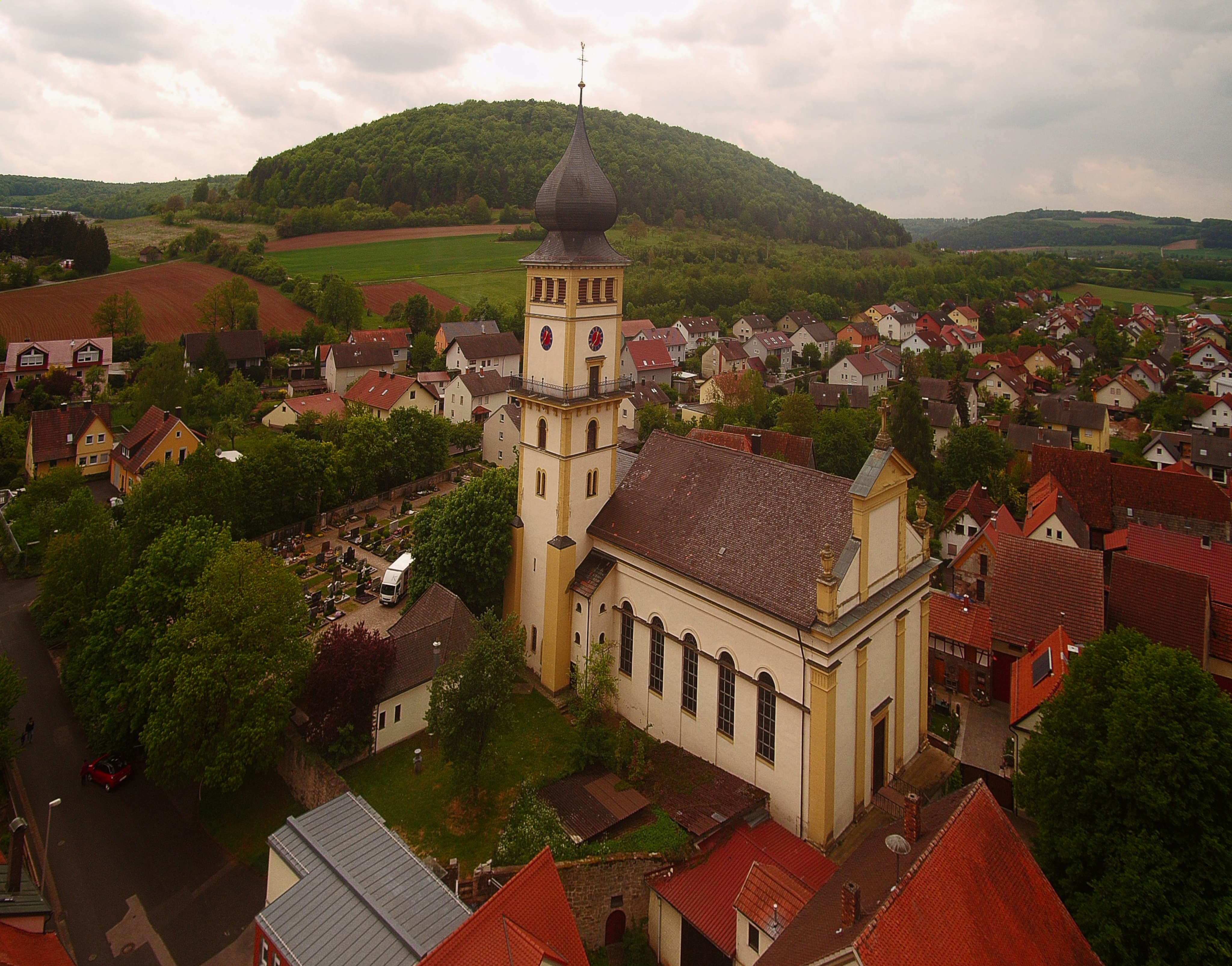 Pfarrkirche in Langendorf, Gemeinde Elfershausen